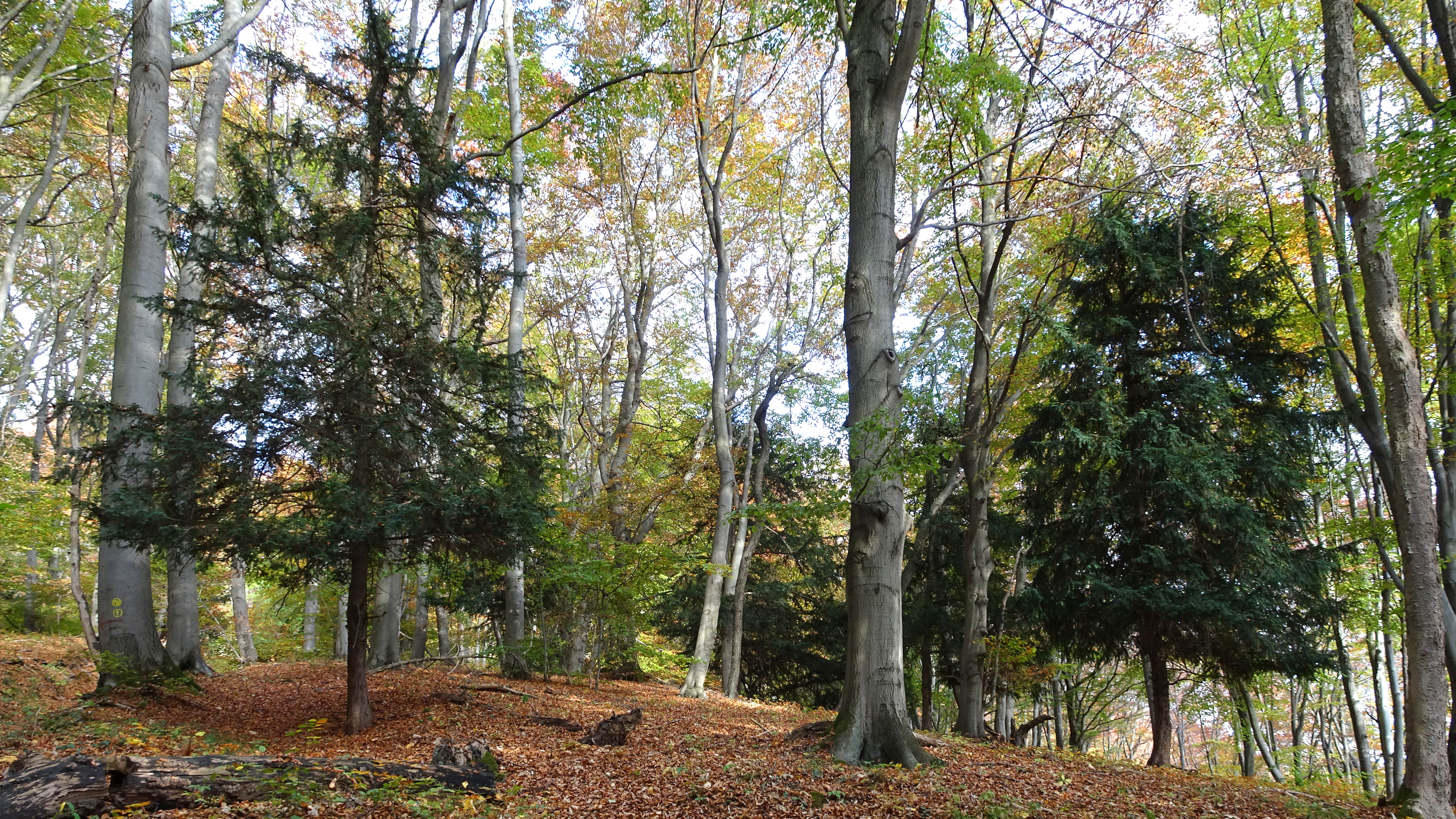 Das 716 Hektar große Flora-Fauna-Habitat-Gebiet „Stein-Rachelsberg-Gobert“ mit der Nummer 4726-320 und der thüringeninternen Kennung 19 wird von den Höhenzügen und Steilhängen des Werraberglandes geprägt. Als bedeutsam angesehen werden die alt- und totholzreichen, naturnahen Waldmeister- und Orchideen-Buchenwälder, die Felsbänder sowie die Halbtrockenrasen und Wacholderheiden. Als besonders erwähnenswert gelten die zahlreichen im Gebiet vorhandenen Eiben, die durch forstliche Maßnahmen in ihrem Bestand erhalten und gefördert werden sollen, wie hier am „Bärentriesch“. Die Waldflächen befinden sich vollständig im EU-Vogelschutzgebiet 4626-420 „Werrabergland südwestlich Uder“, Naturpark „Eichsfeld-Hainich-Werratal“ und Landschaftsschutzgebiet „Obereichsfeld“.